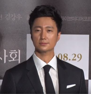 디스패치 구독 클릭! Dispatch Subscribe